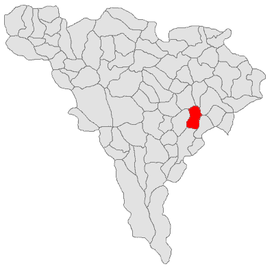 Categorie:Hărţi ale judeţului Alba